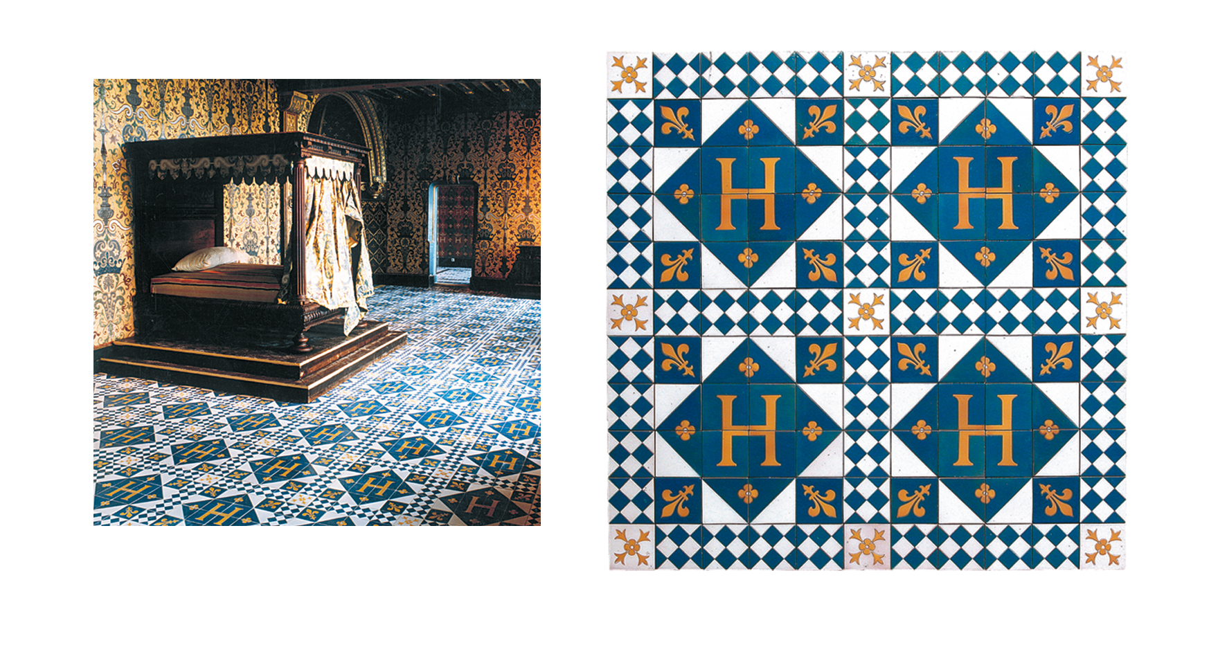 Céramiques décorées main par l'entreprise Terres Cuites de Raujolles pour les sols du château de Blois